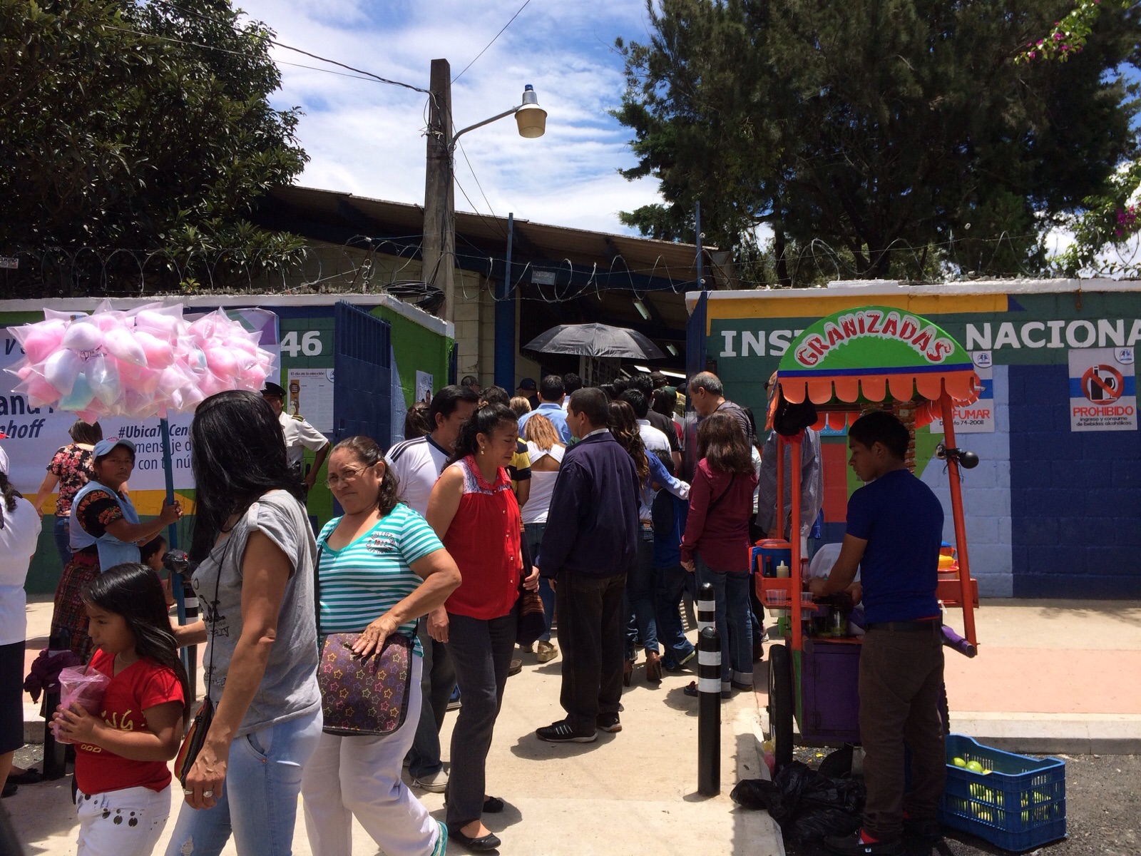 Elecciones generales de Guatemala de 2015